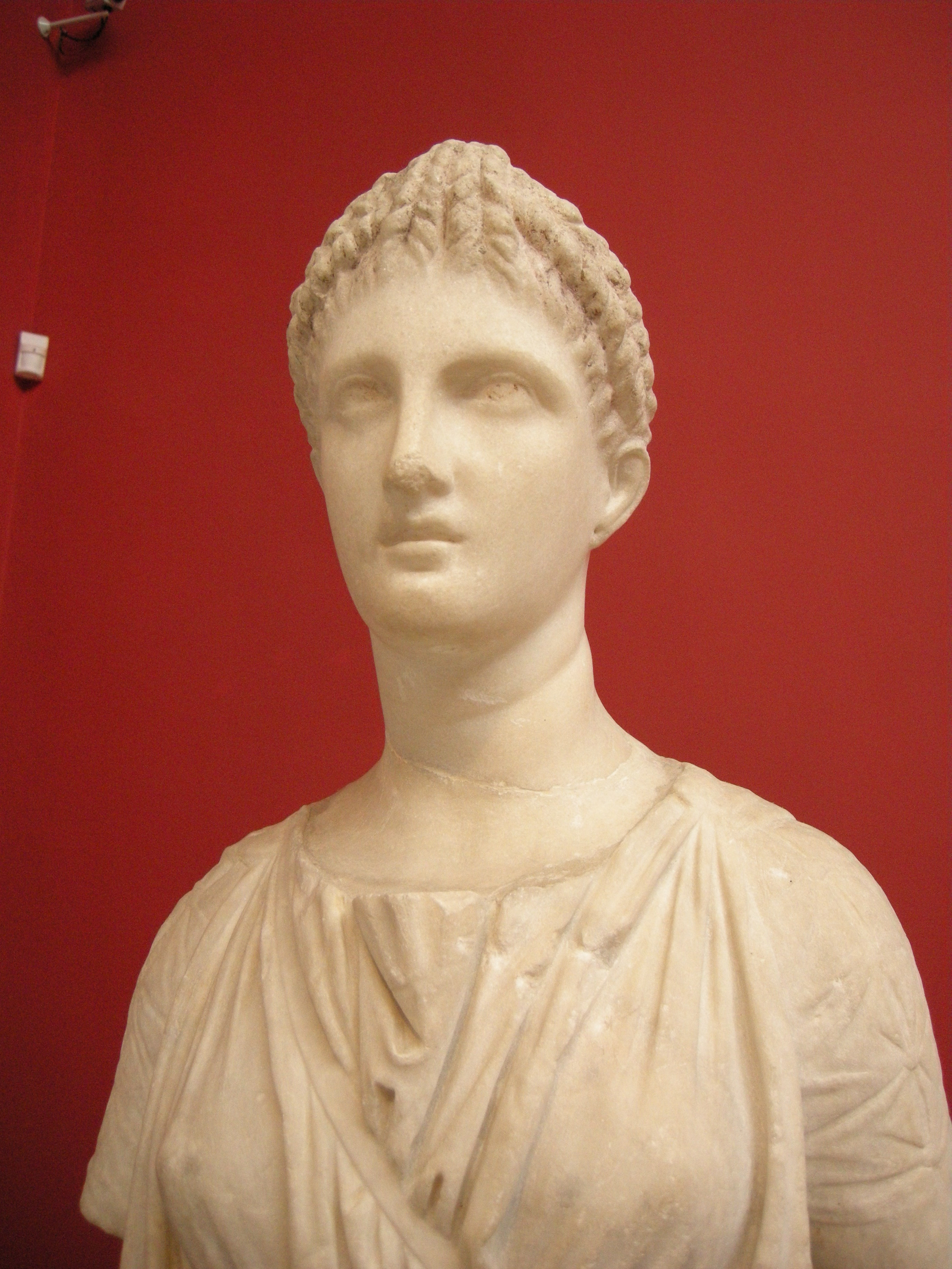 Artemis diadoumena 1st century bc